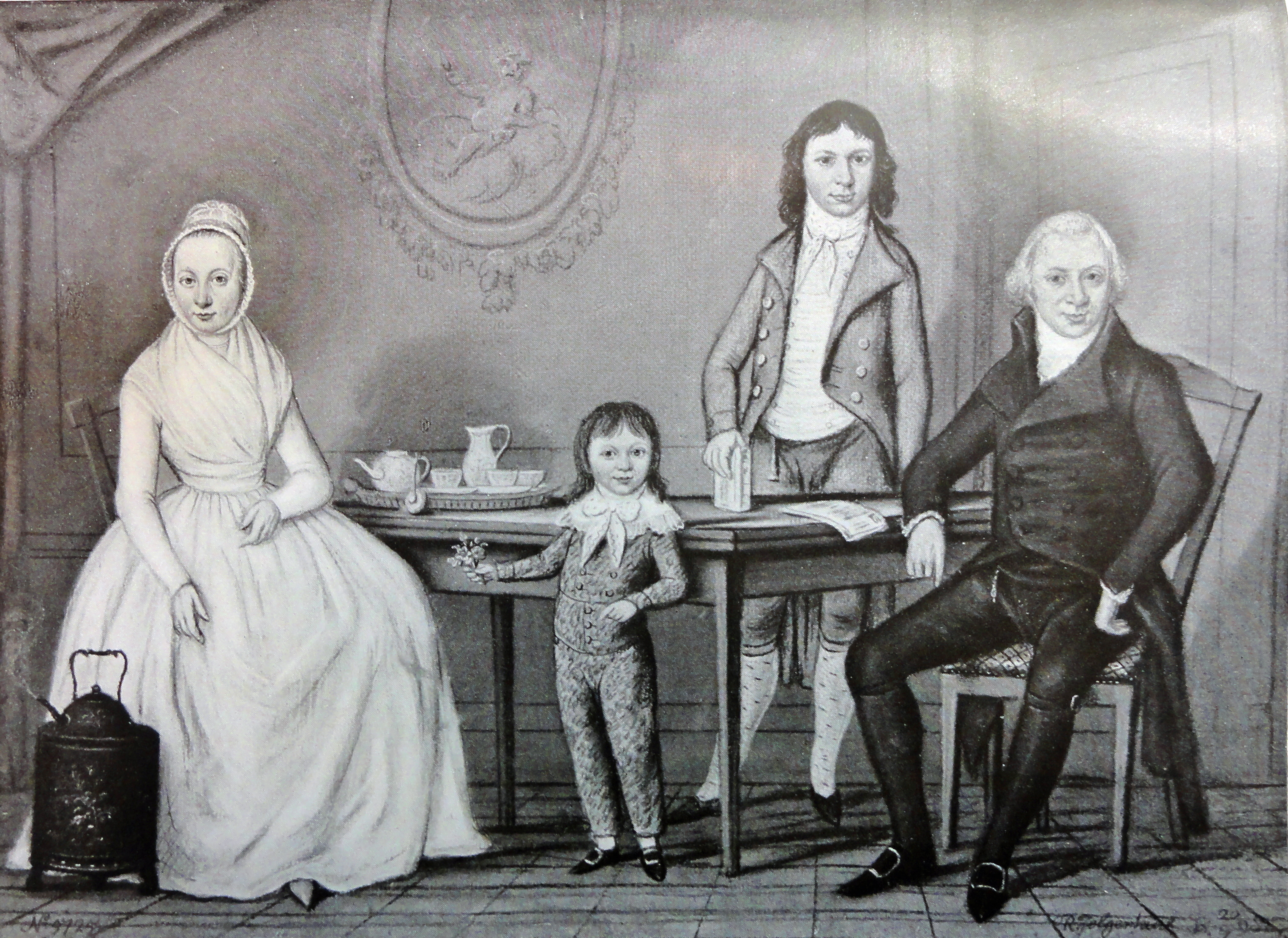 Het gezin van de Arnhemse uitgever Paulus Nijhoff in 1798